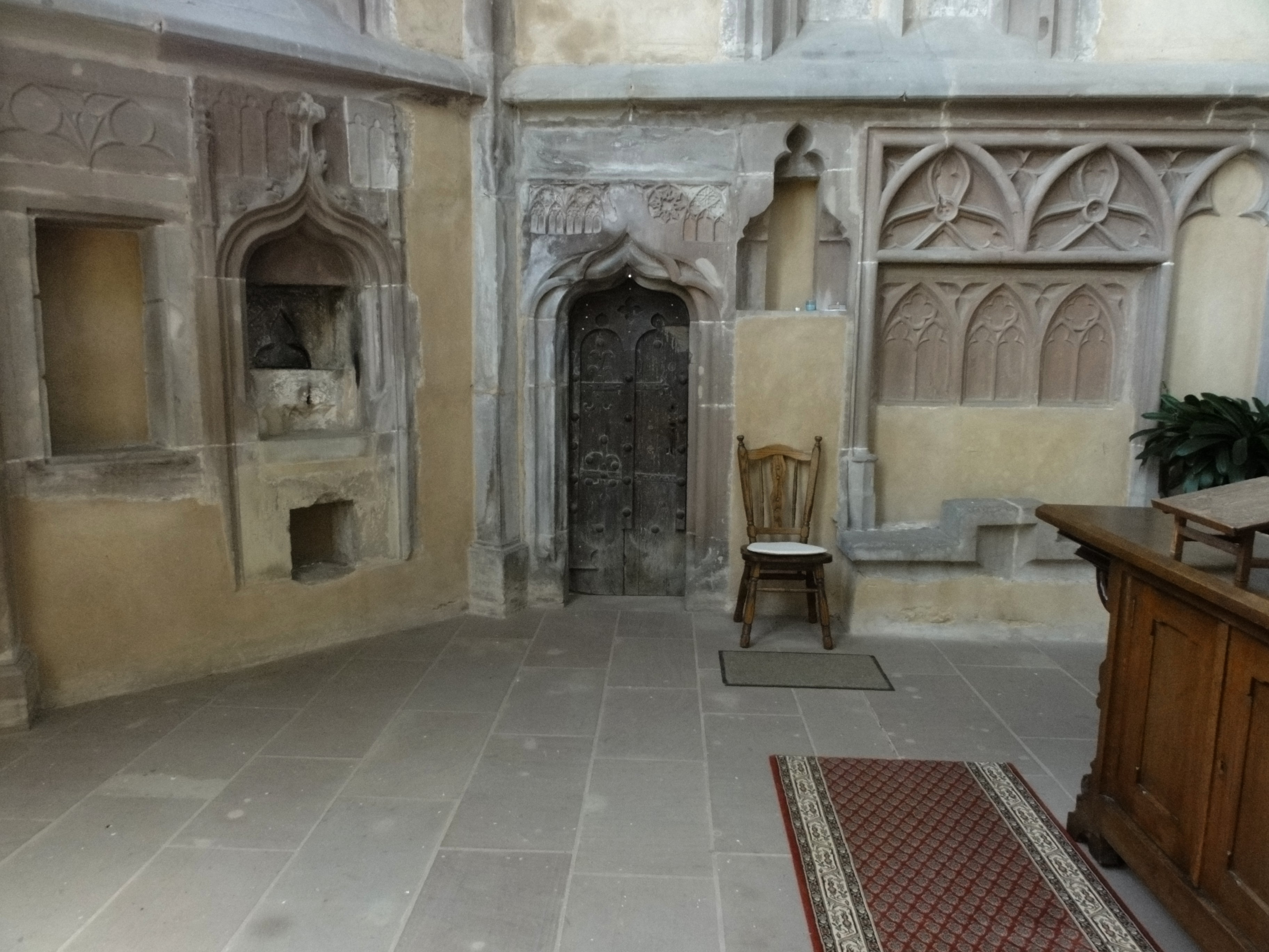 Alsace, Bas-Rhin, Église protestante Saint-Gall de Domfessel (PA00084693, IA67005785).Armoire eucharistique et porte de la sacristie entourée de reliefs gothiques.